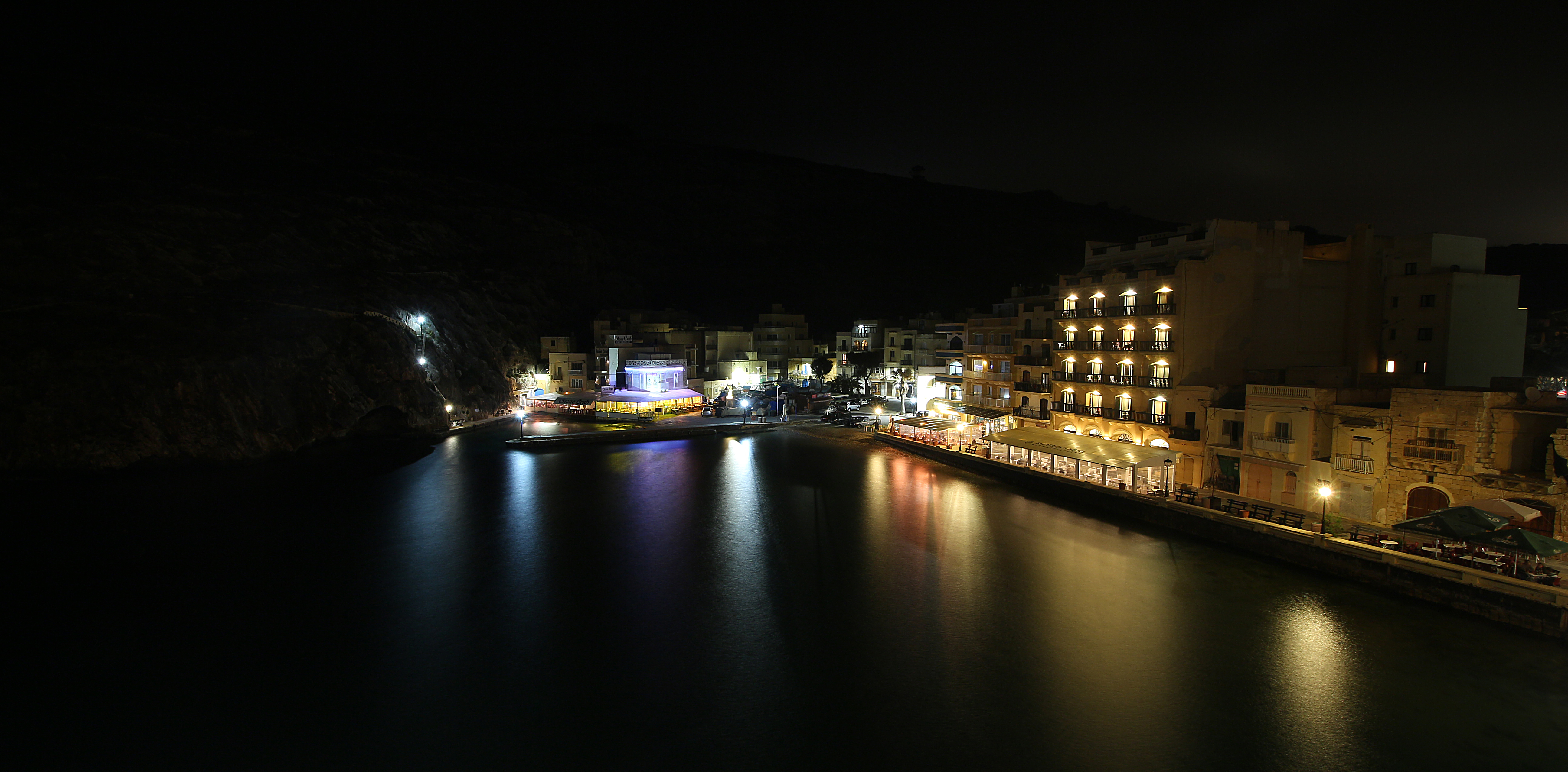 Xlendi Bay på Gozo på natten